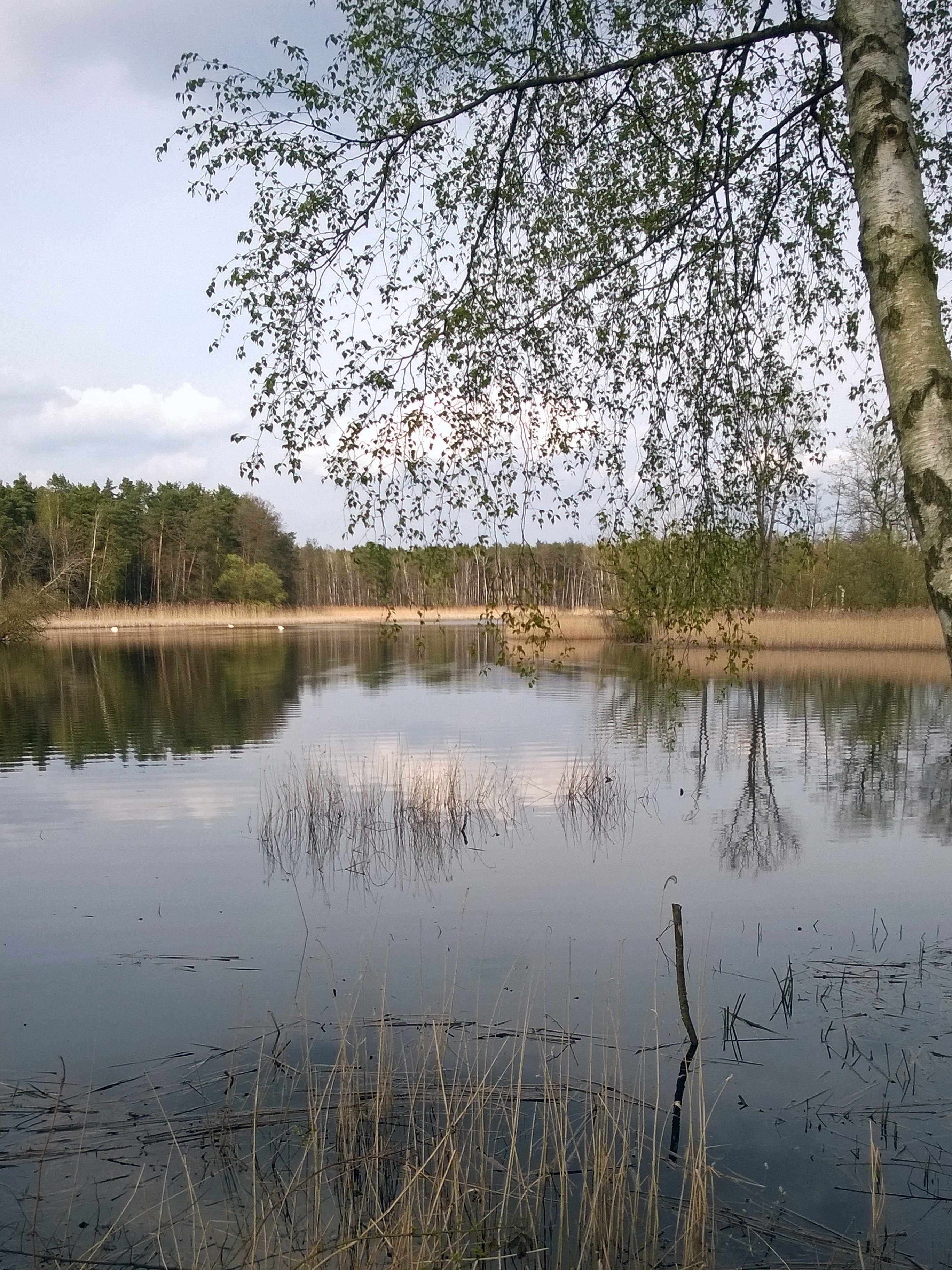 Landschaft am Grenzstein Nr. 88 Historische Landesgrenze Königreich Sachsen Königreich Preußen 1815 (Wiener Kongress) Hornjoserbsce: Hatowska krajina při mězniku čo. 88 historiskeje hranicy mjez kralestwomaj Sakska a Pruska